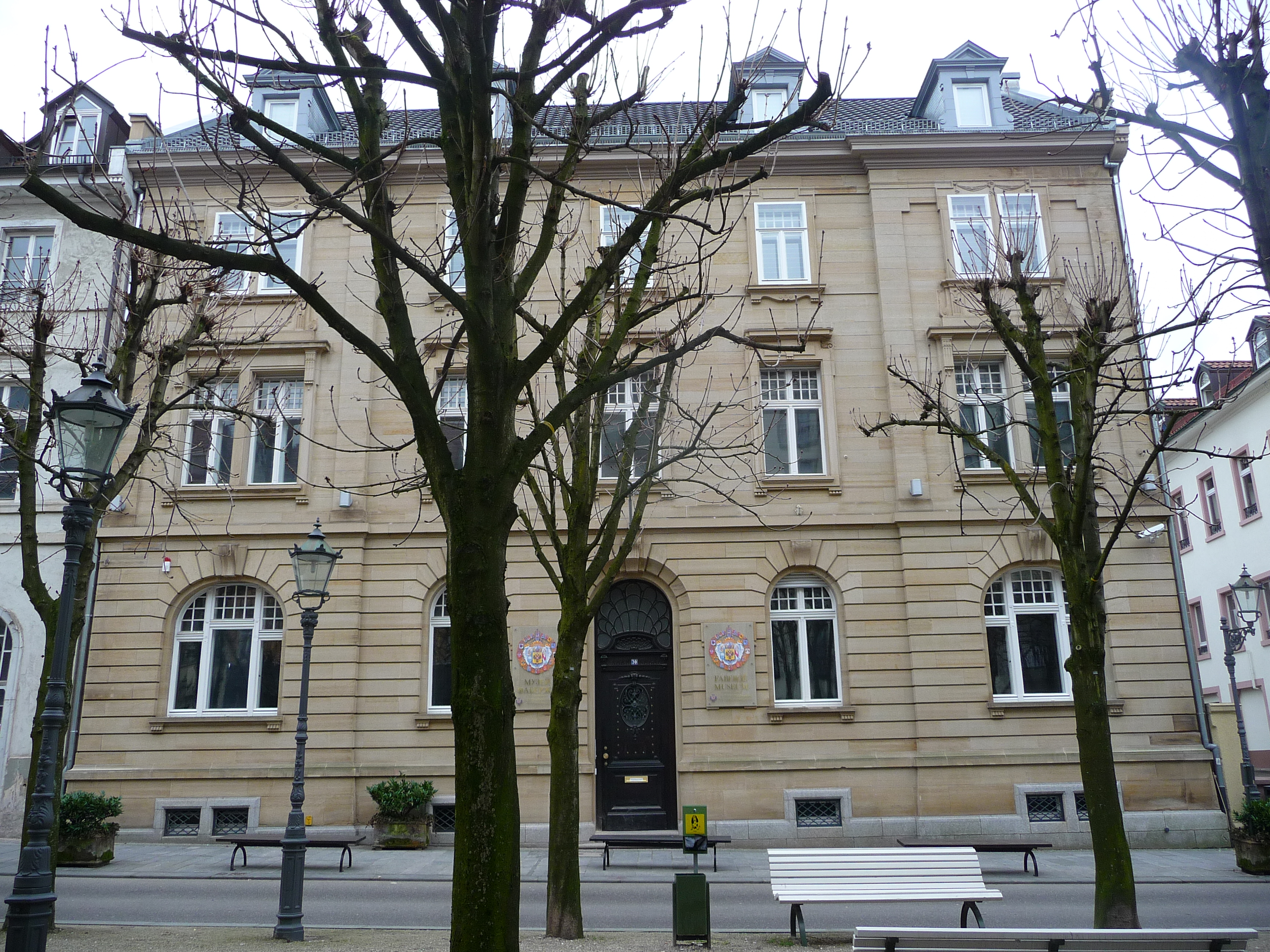 Fabergé Museum in Baden-Baden (Baden-Württemberg, Deutschland) Eröffnung Frühjahr 2009